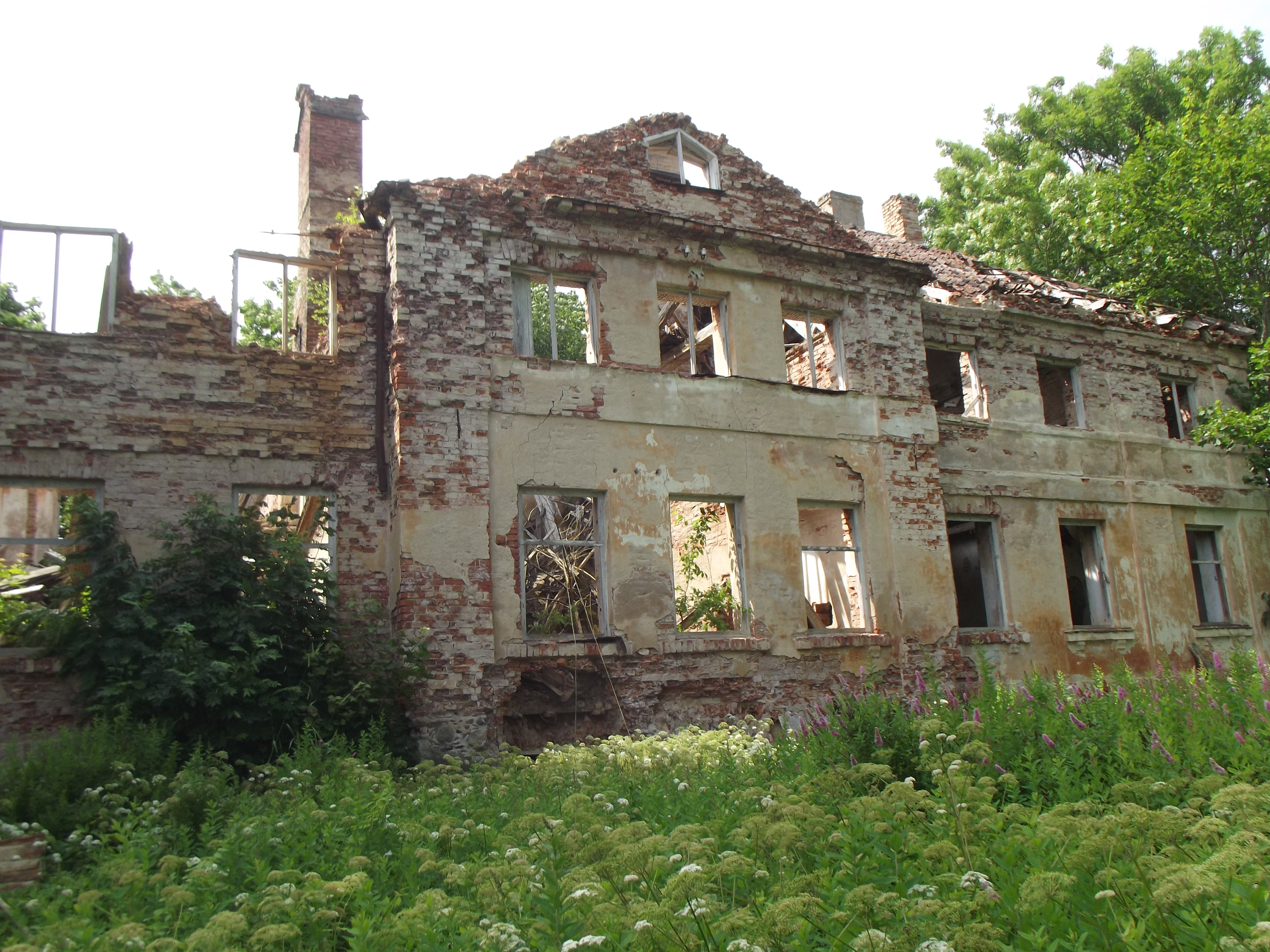 Popervāles muiža